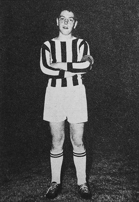 Il calciatore italiano Roberto Bettega nel settore giovanile (all'epoca noto come N.A.G.C. — Nucleo Addestramento Giovani Calciatori) della Juventus nel 1964.